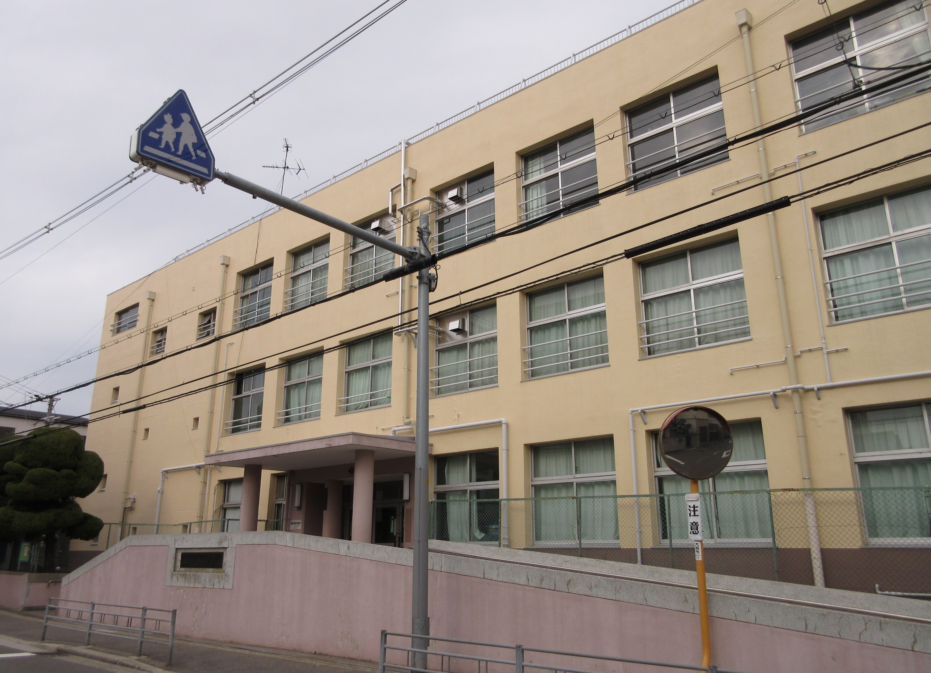 大阪市立敷津浦小学校